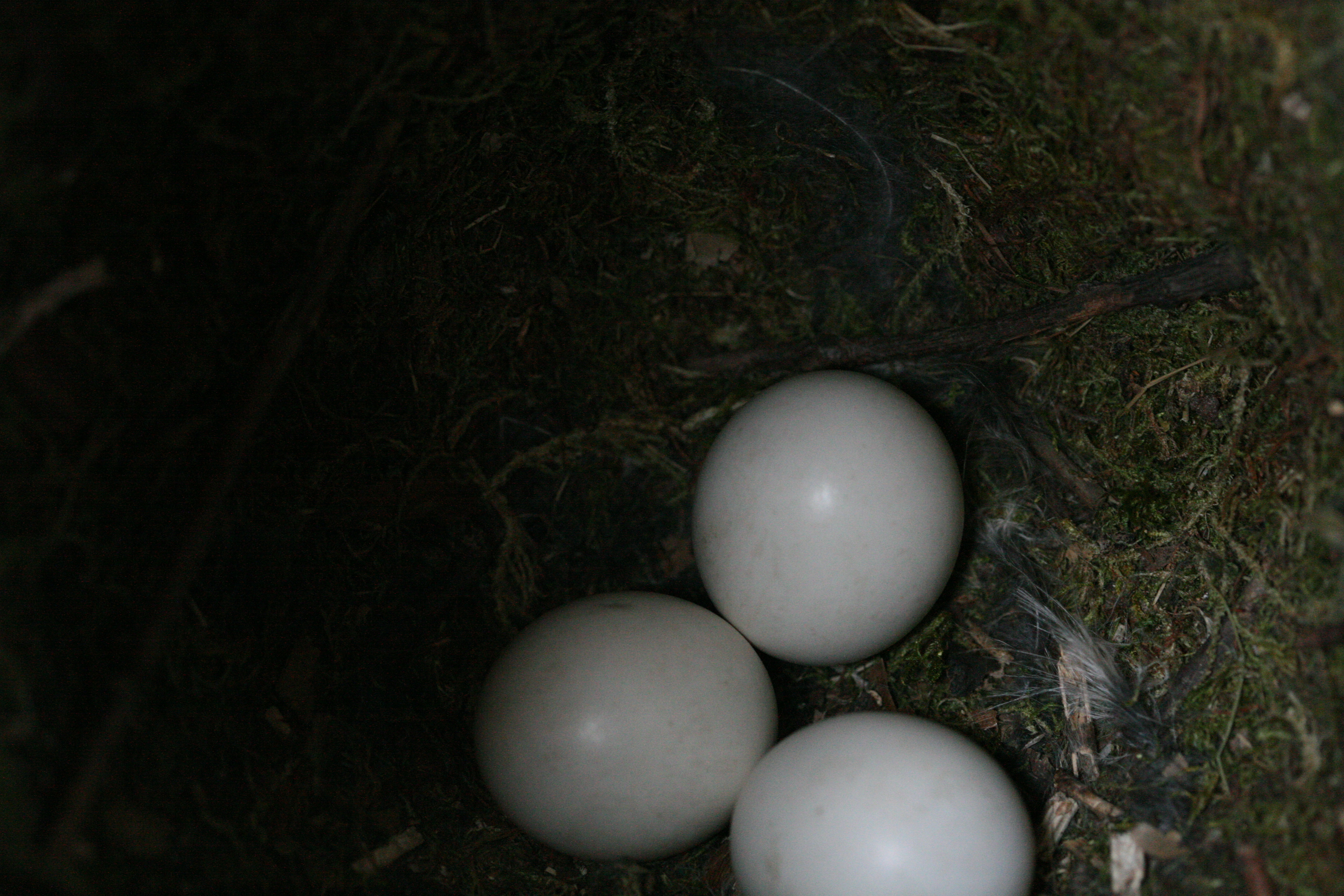 tre kattuggleägg i holk